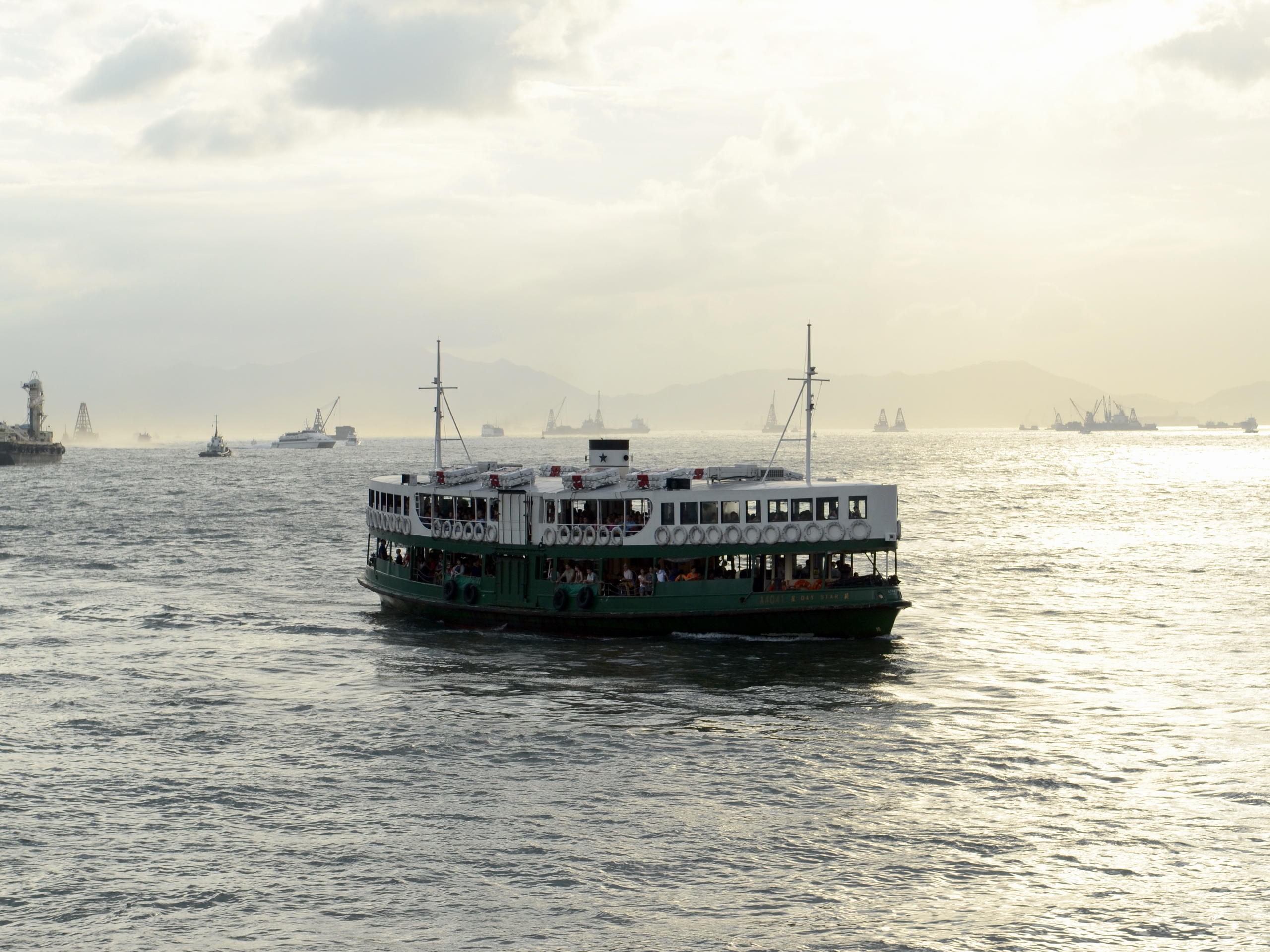 天星小轮 晨星（Day Star）